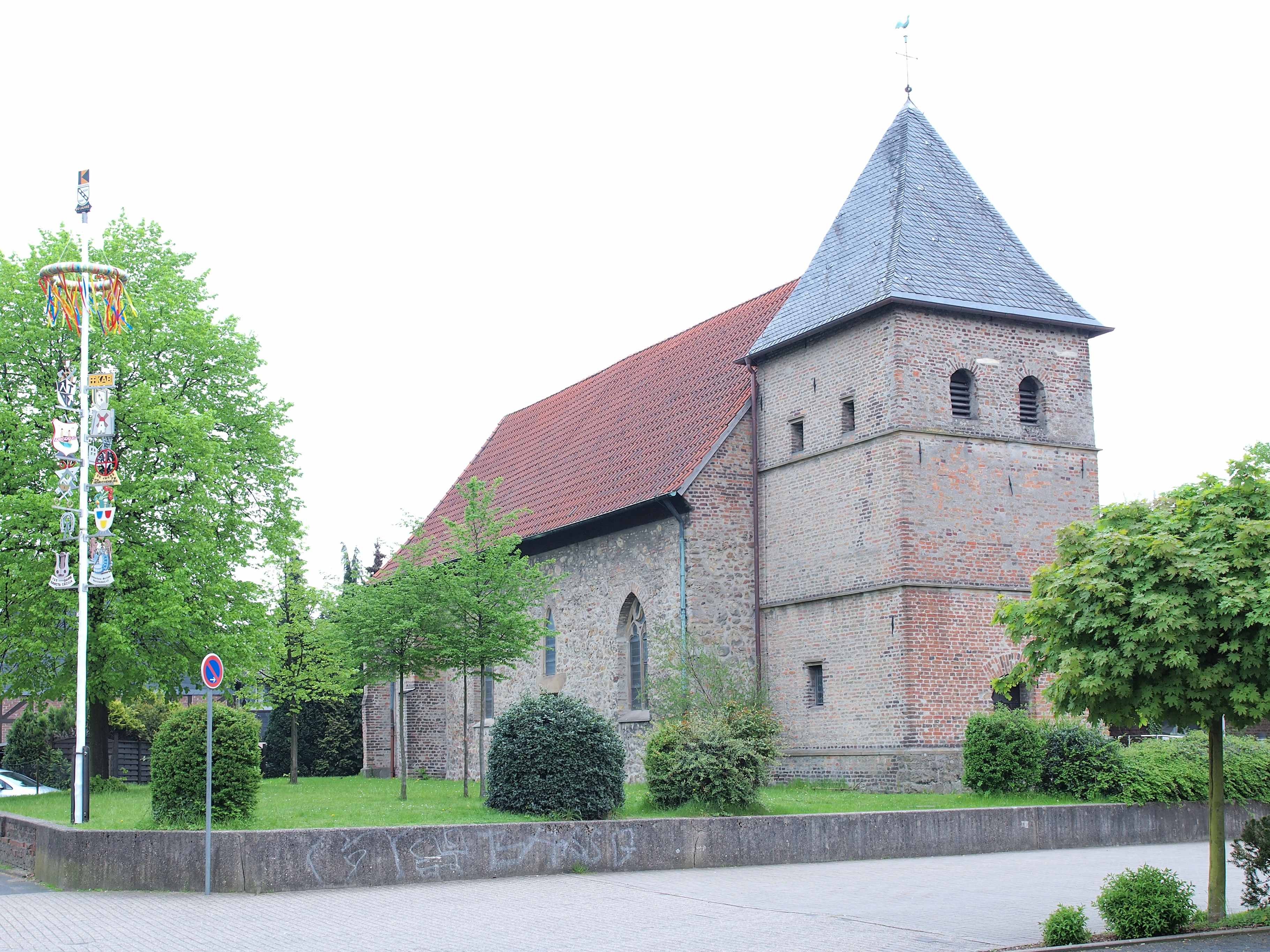 Die ehemalige kath. Kirch St. Lambertus (Henrichenburg, Castrop-Rauxel, Alter Kirchplatz), heute Maximilian-Kolbe-Haus